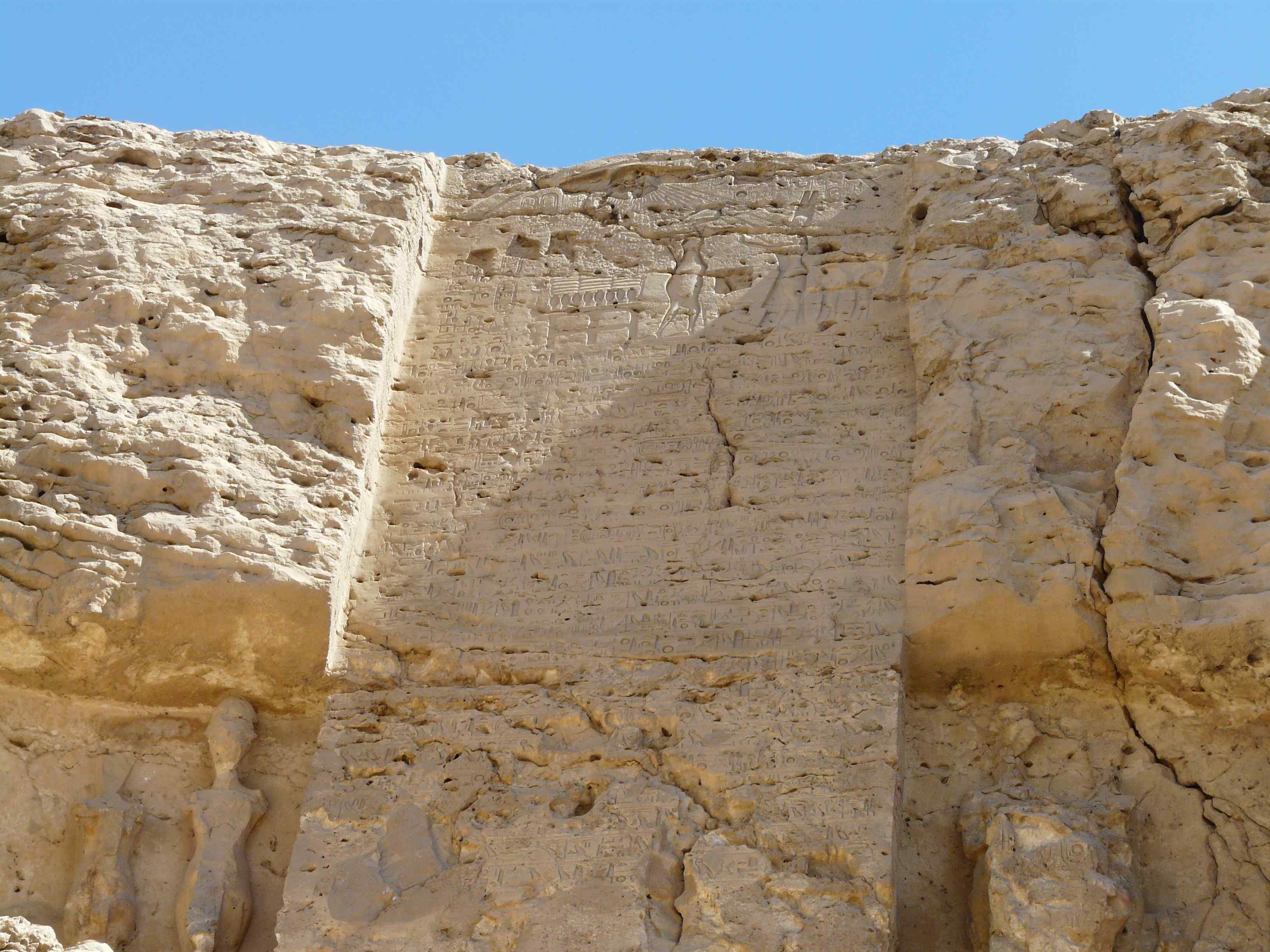 Amarna - Stèle frontière U